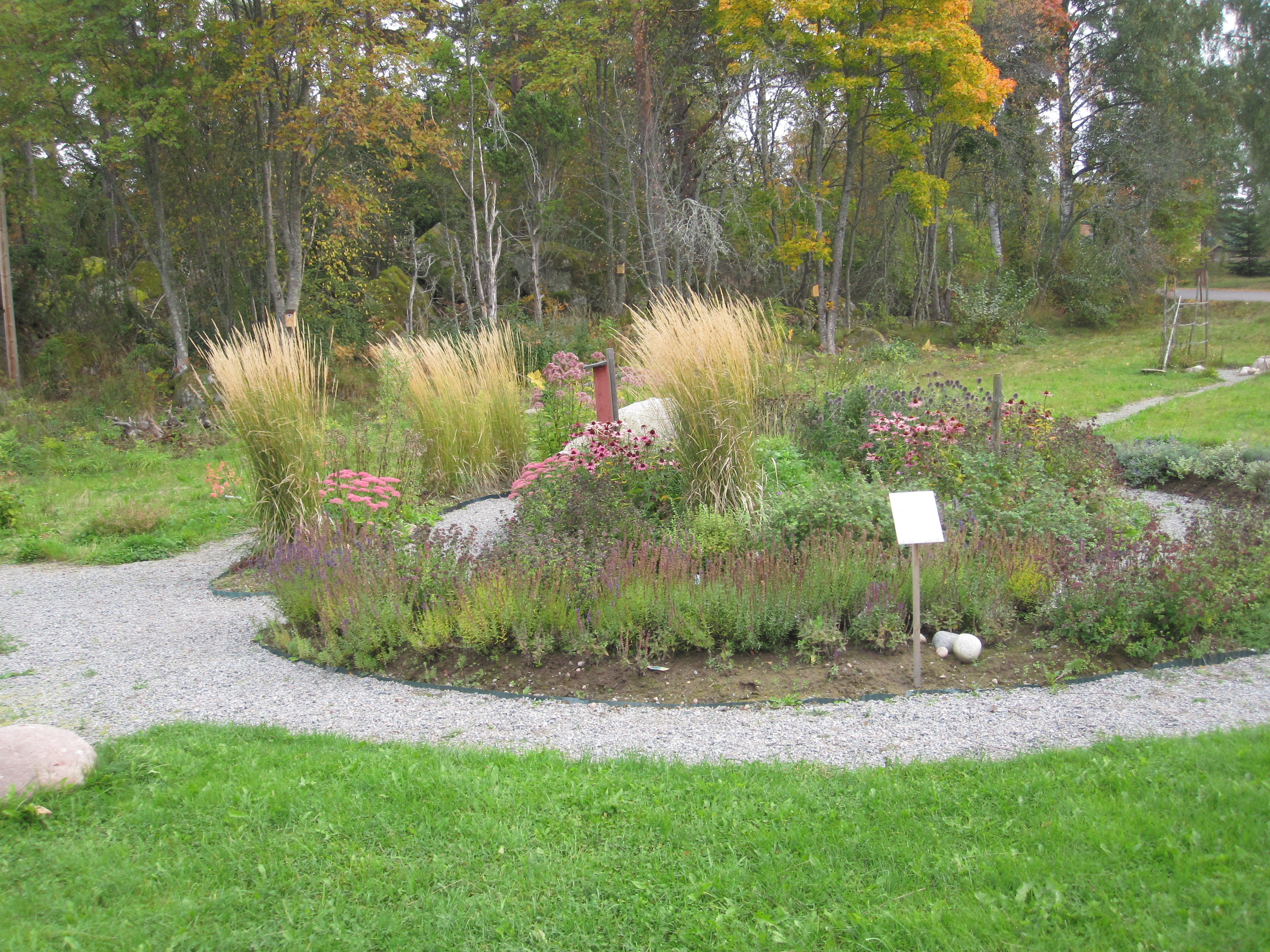 Fjärilsträdgården anlades av trädgårdsmästarstudenter 2008. Uppvuxen och fin är den välbesökt från tidig vår till sen höst av olika fjärilar och andra insekter.